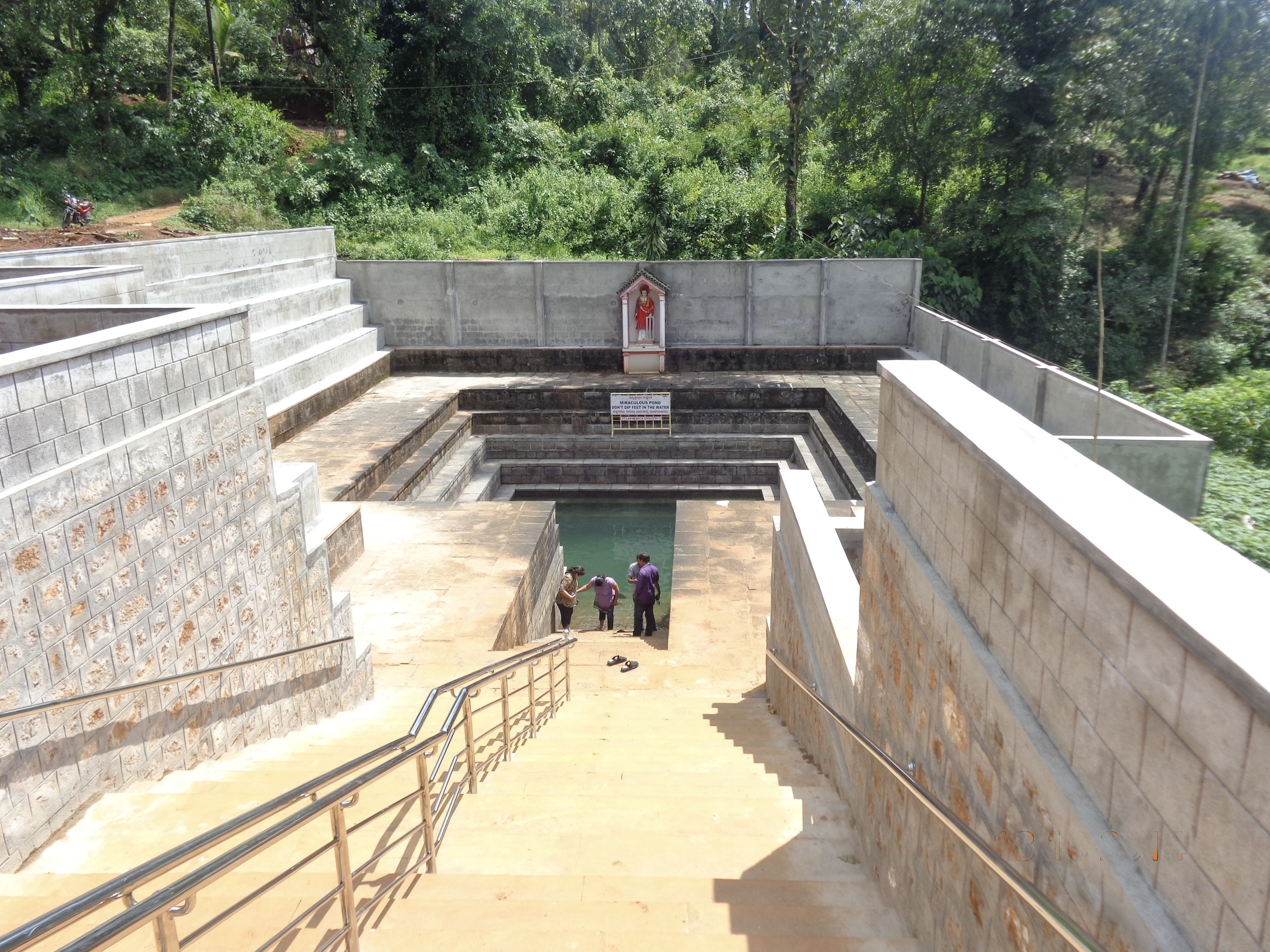 st Laurence chrurch, devite pond Attur north, Karkala, Karnataka, India